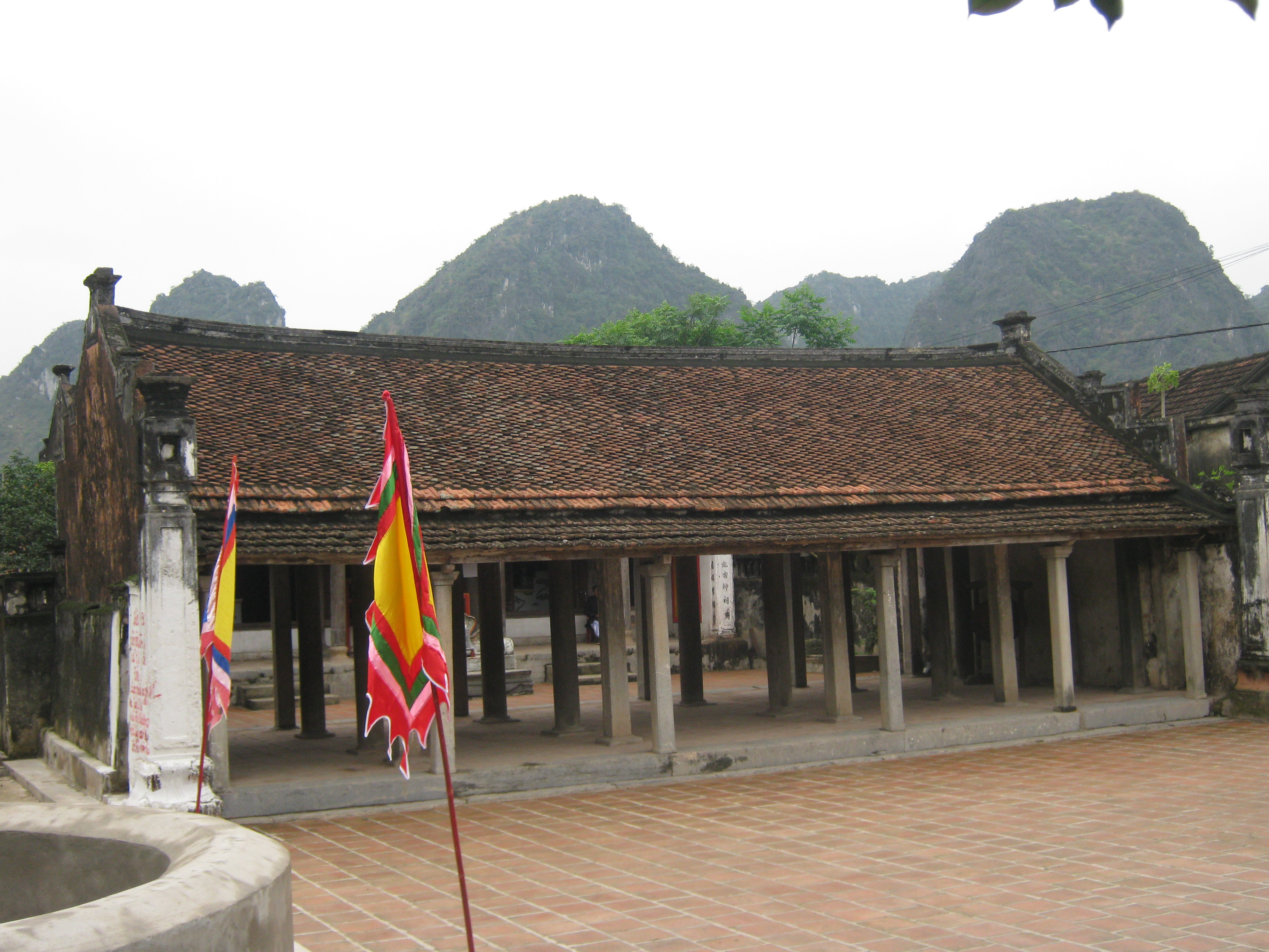 Đình Yên Trạch - chùa Nhất Trụ ở Khu di tích Cố đô Hoa Lư